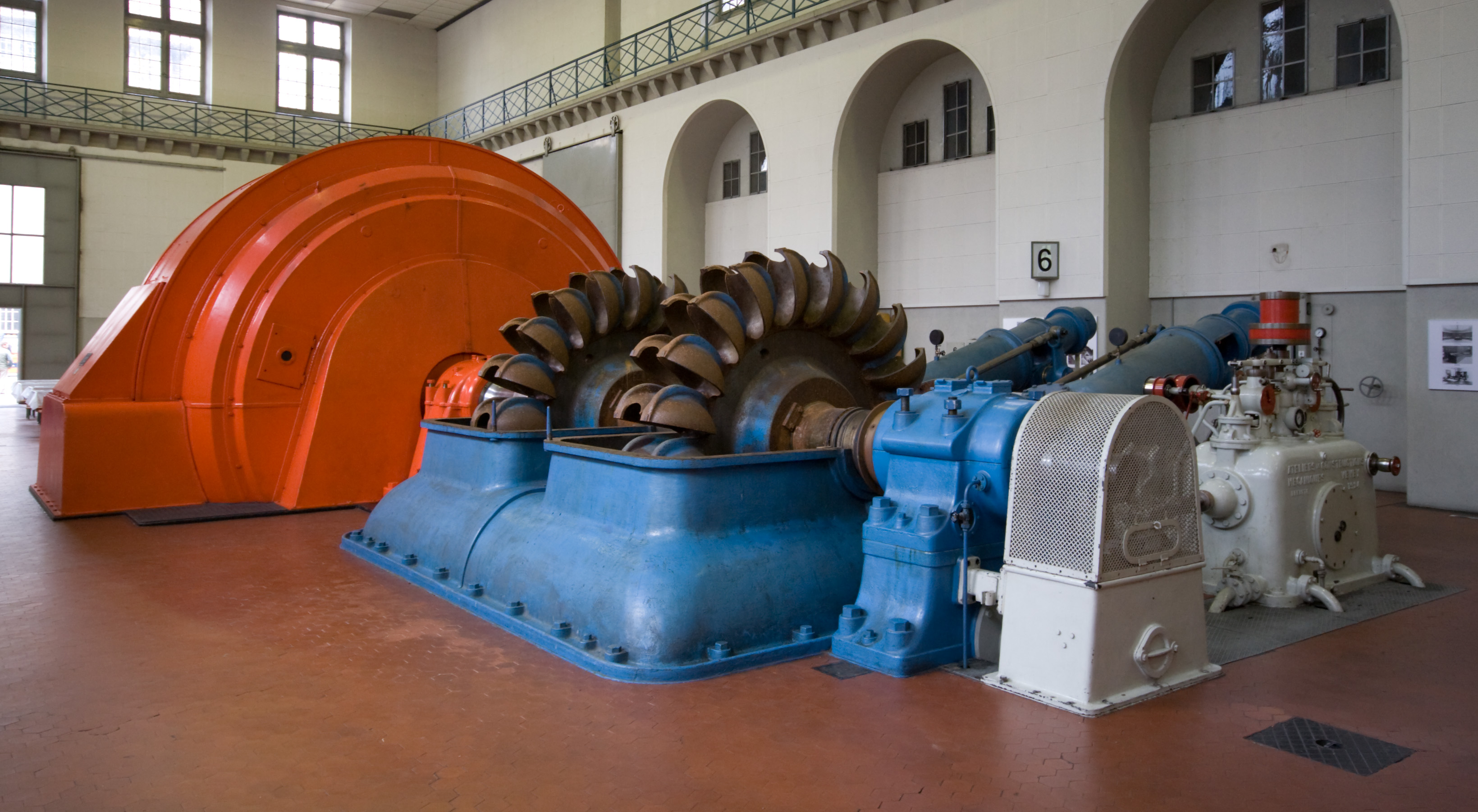 Stillgelegte Turbine und Generator im Kraftwerk Amsteg / Retired turbine and generator at Amsteg power plant